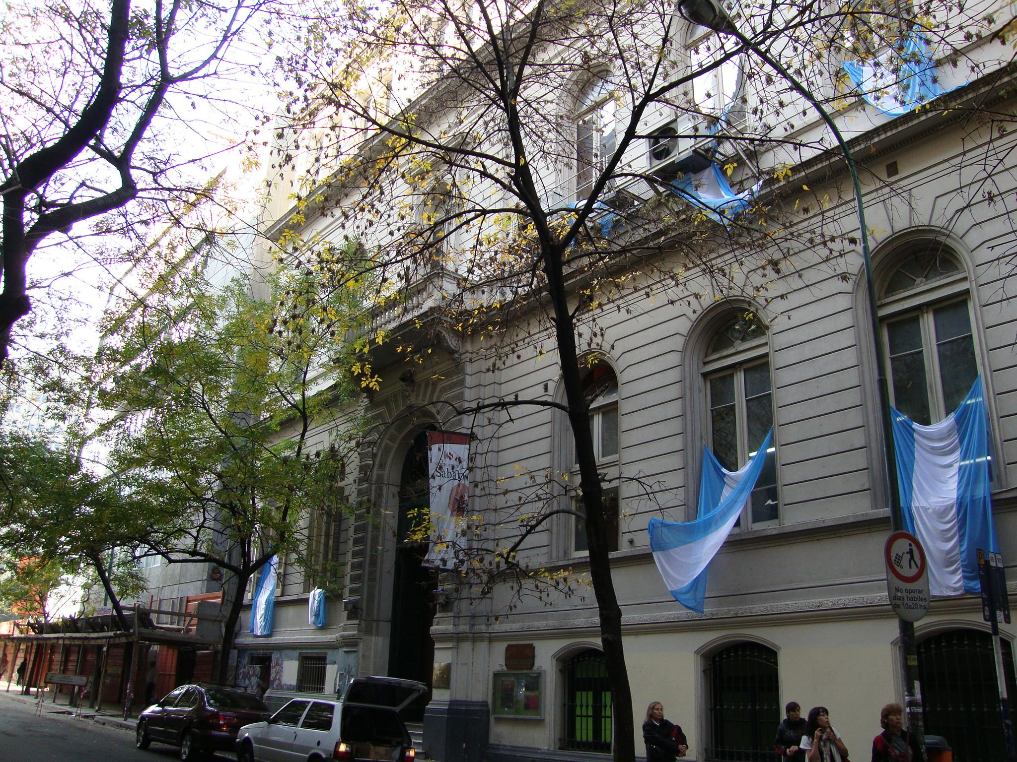 Fachada del edificio del Centro Cultural Sábato, perteneciente a la Facultad de Ciencias Económicas de la Universidad de Buenos Aires. Aparece embanderado con motivo del 200 Aniversario de la Revolución de Mayo. Calle José E. Uriburu 763. Buenos Aires, Argentina.